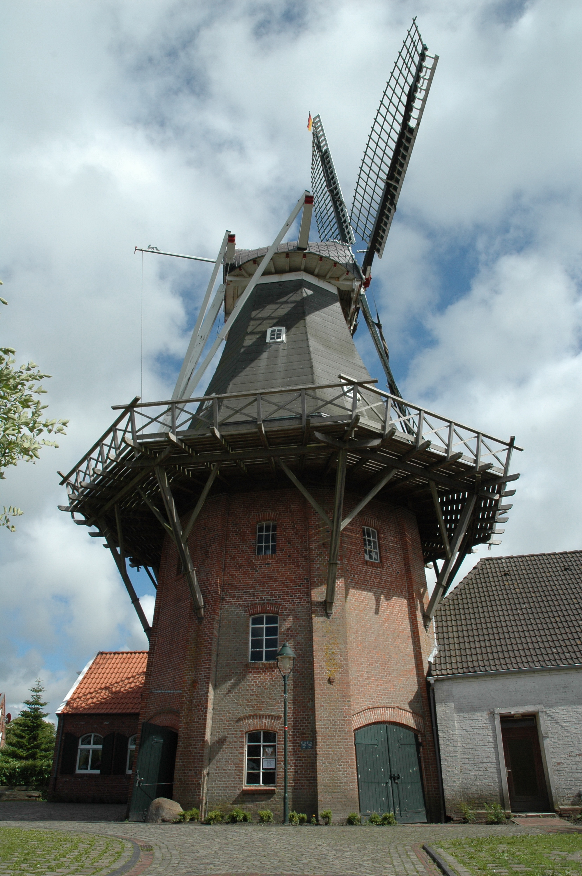 Windmühle in Rysum